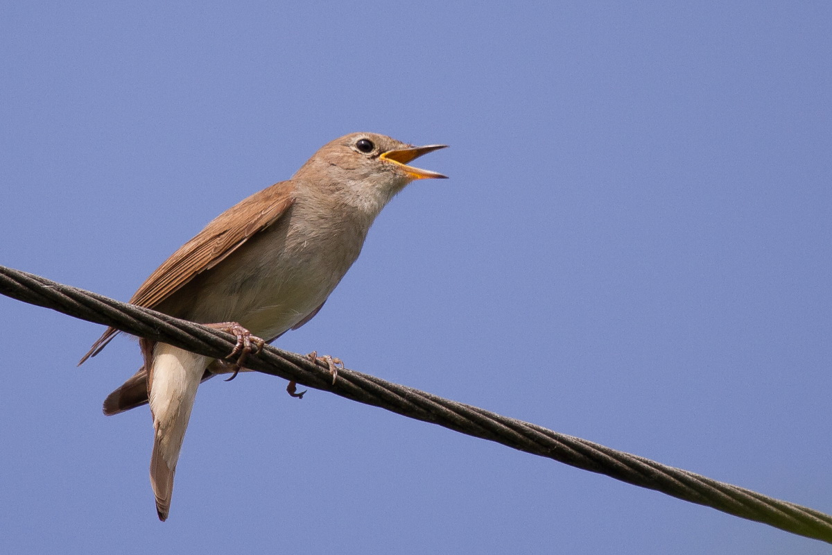 Singende Nachtigall auf Stromdraht im Naturschutzgebiet Bislicher Insel in NRW, Deutschland